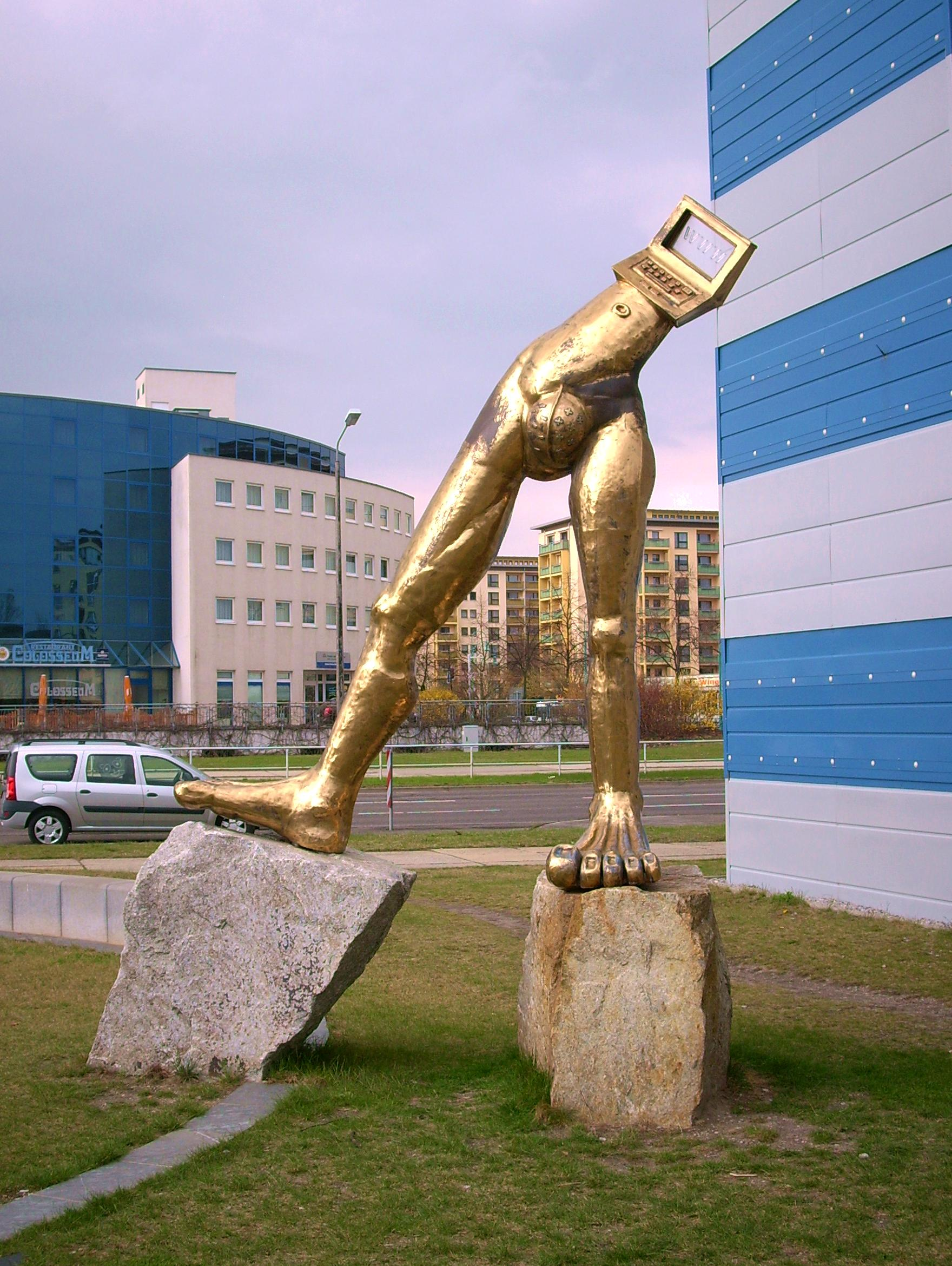 Plastik „Laptop-Mann“ (2009) von Thomas Reimann, am Zuse-Haus in WK V, Virchowstraße in Hoyerswerda